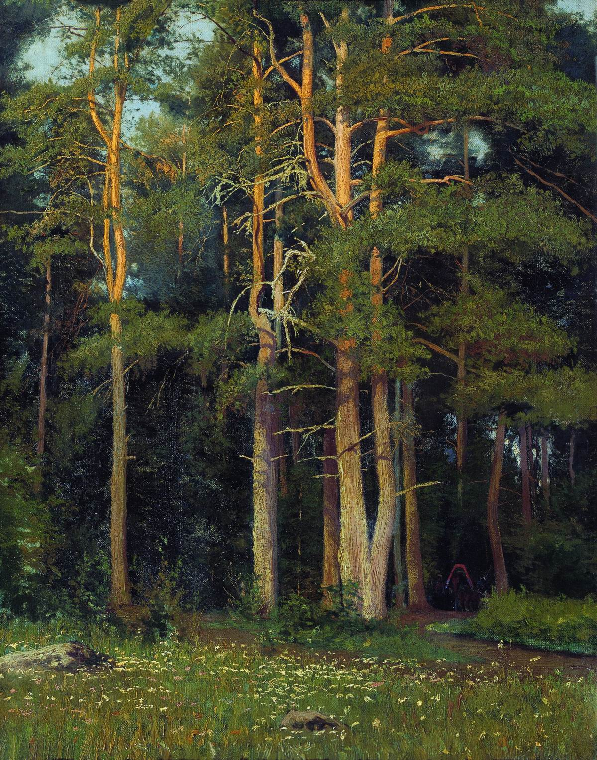 Картина Шишкина И.И.